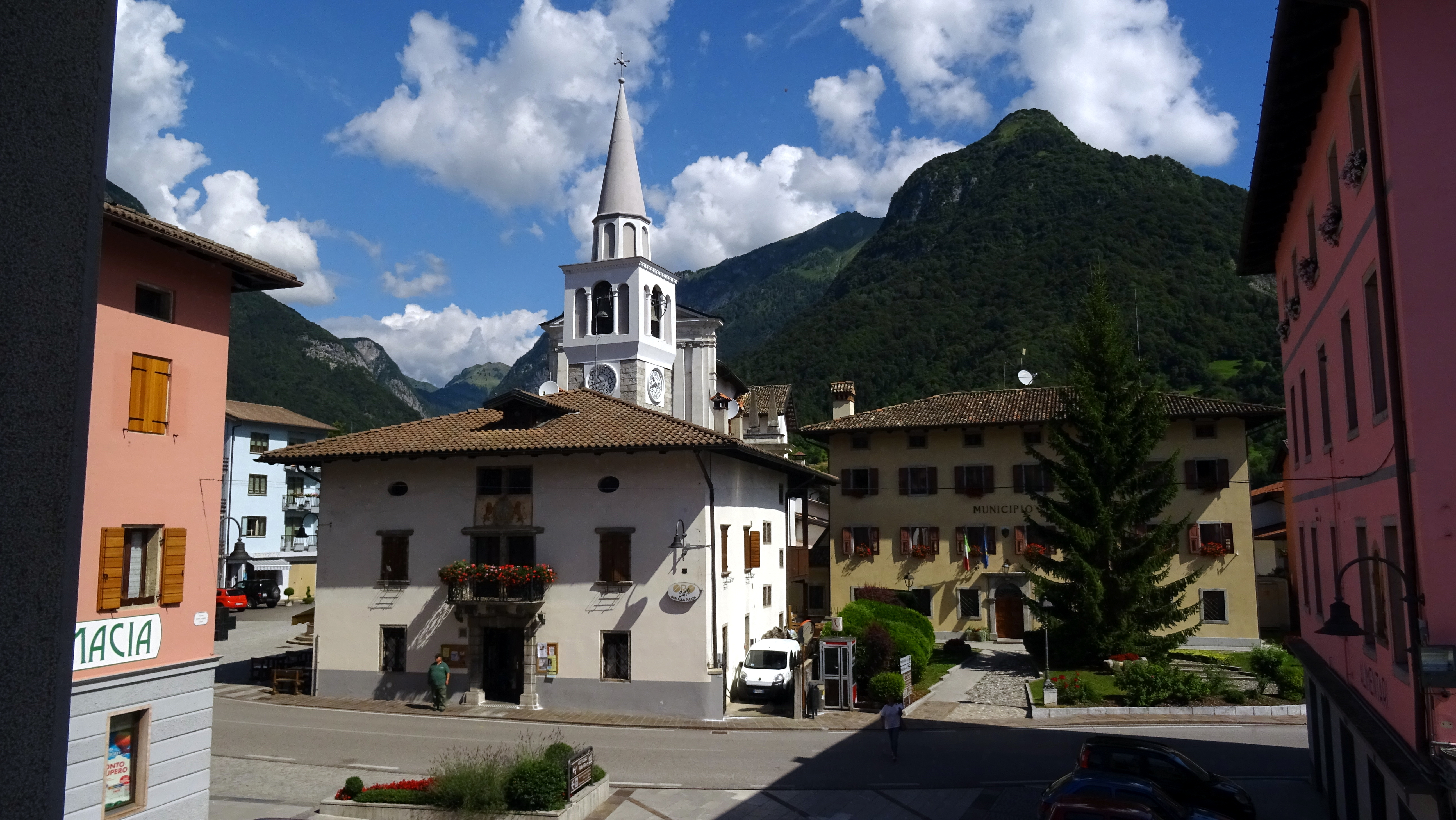 Veduta dal Museo